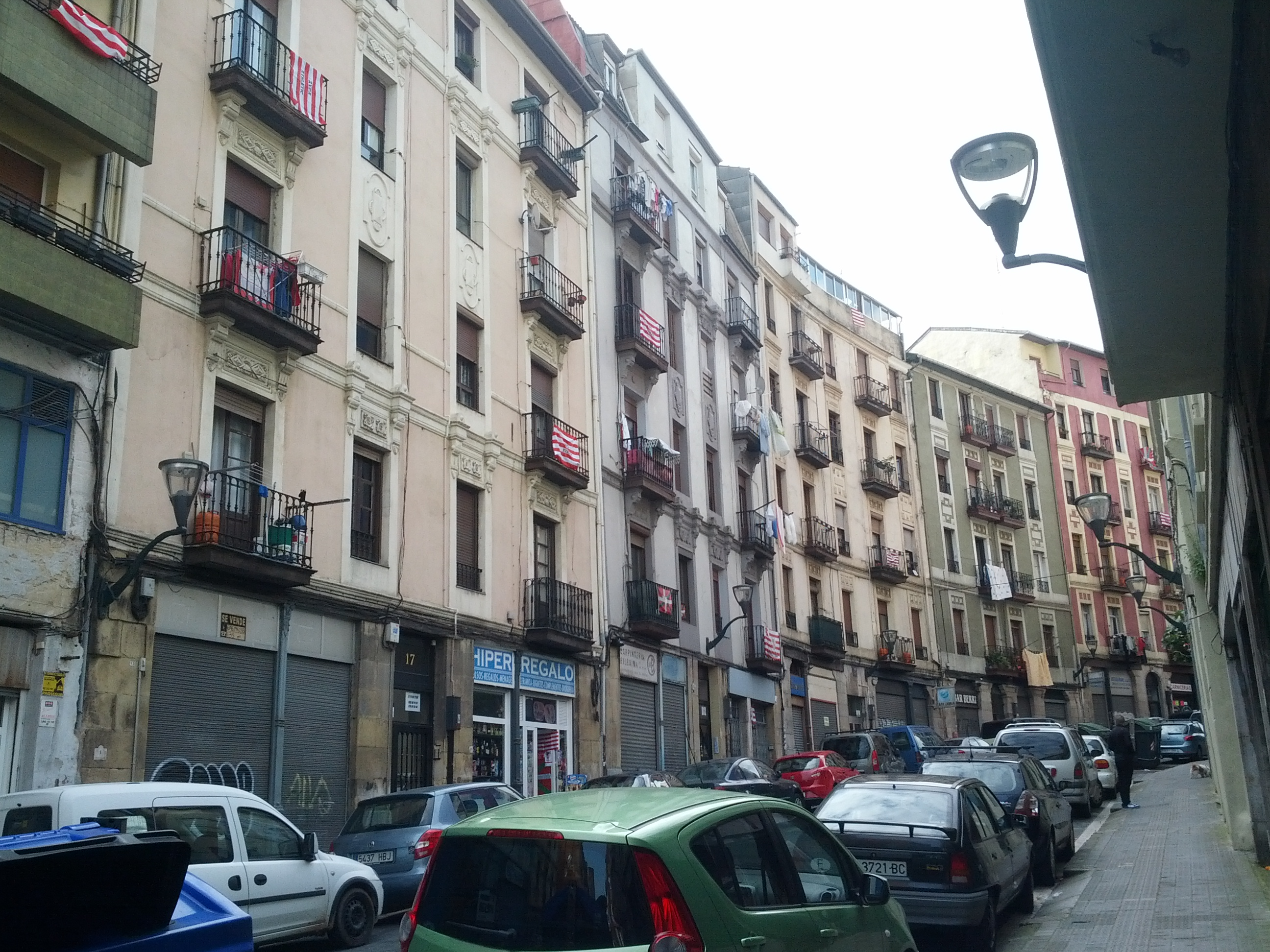 Bilbao in 2015